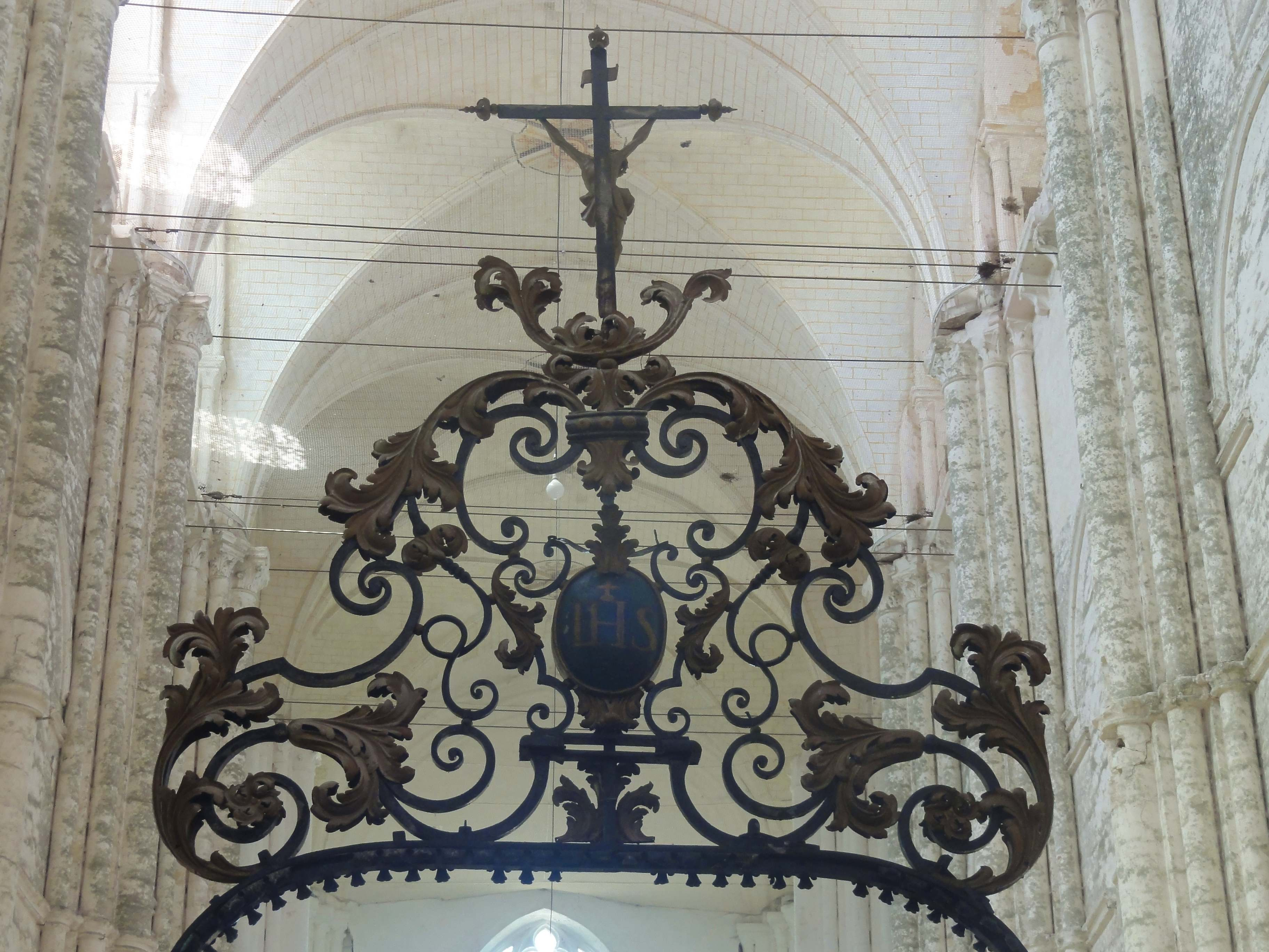 Clôture de chœur, couronnement du portail côté nef.